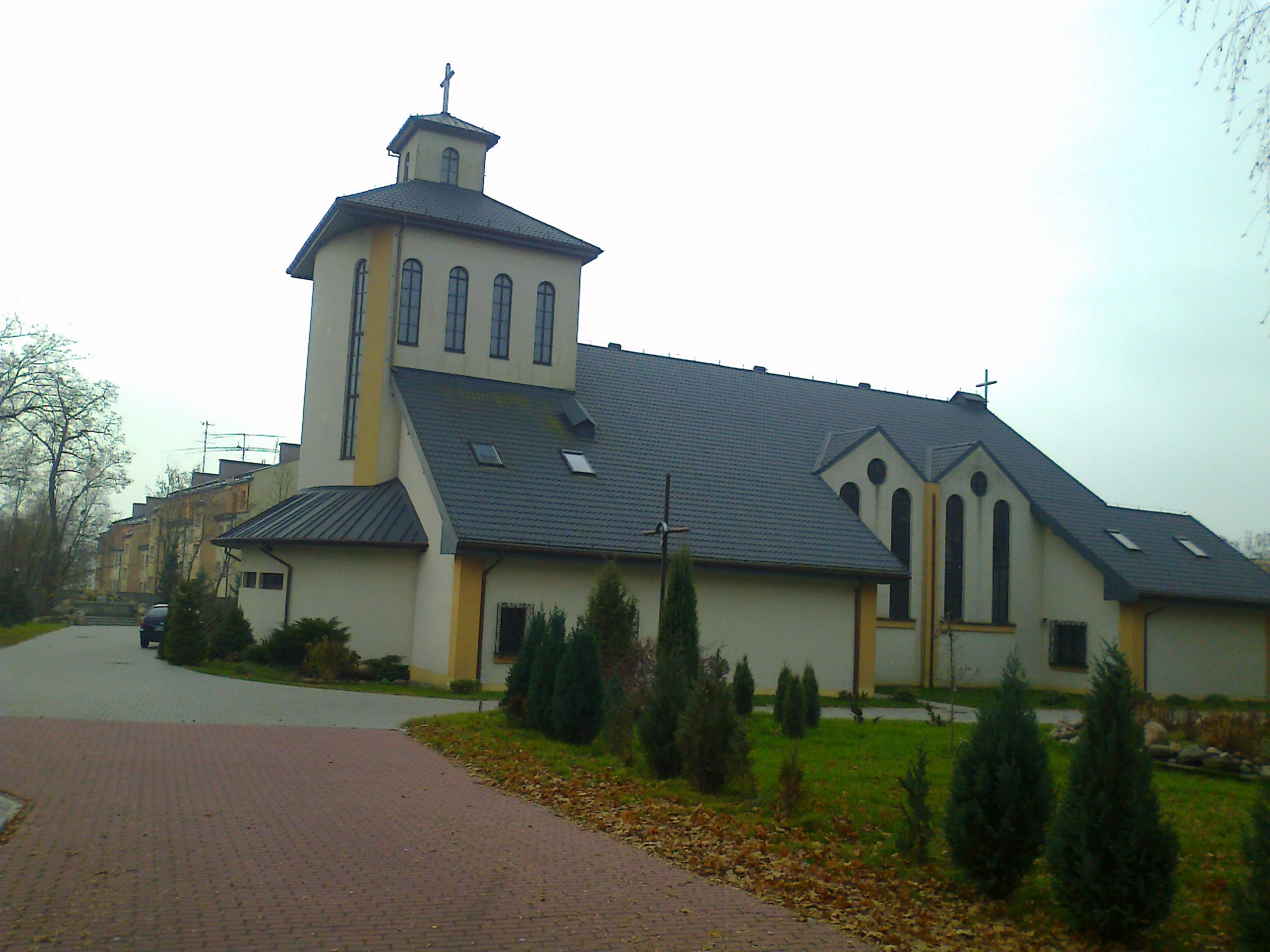 kościół garnizonowy w Zegrzu (pow. legionowski)